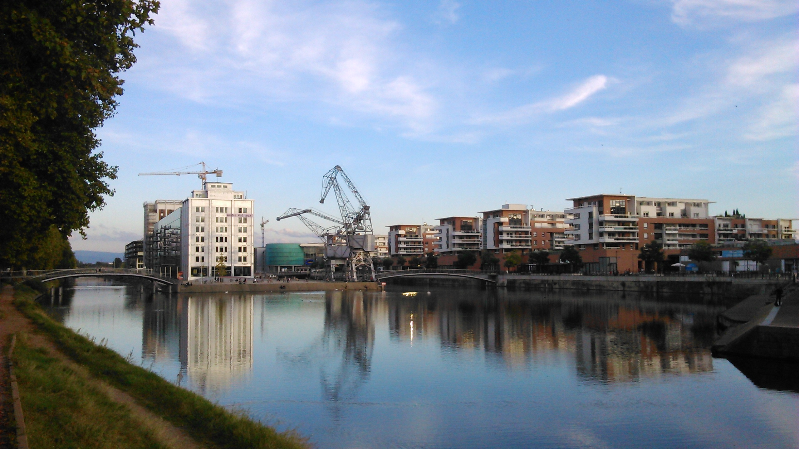 Môle Seegmuller à Strasbourg.